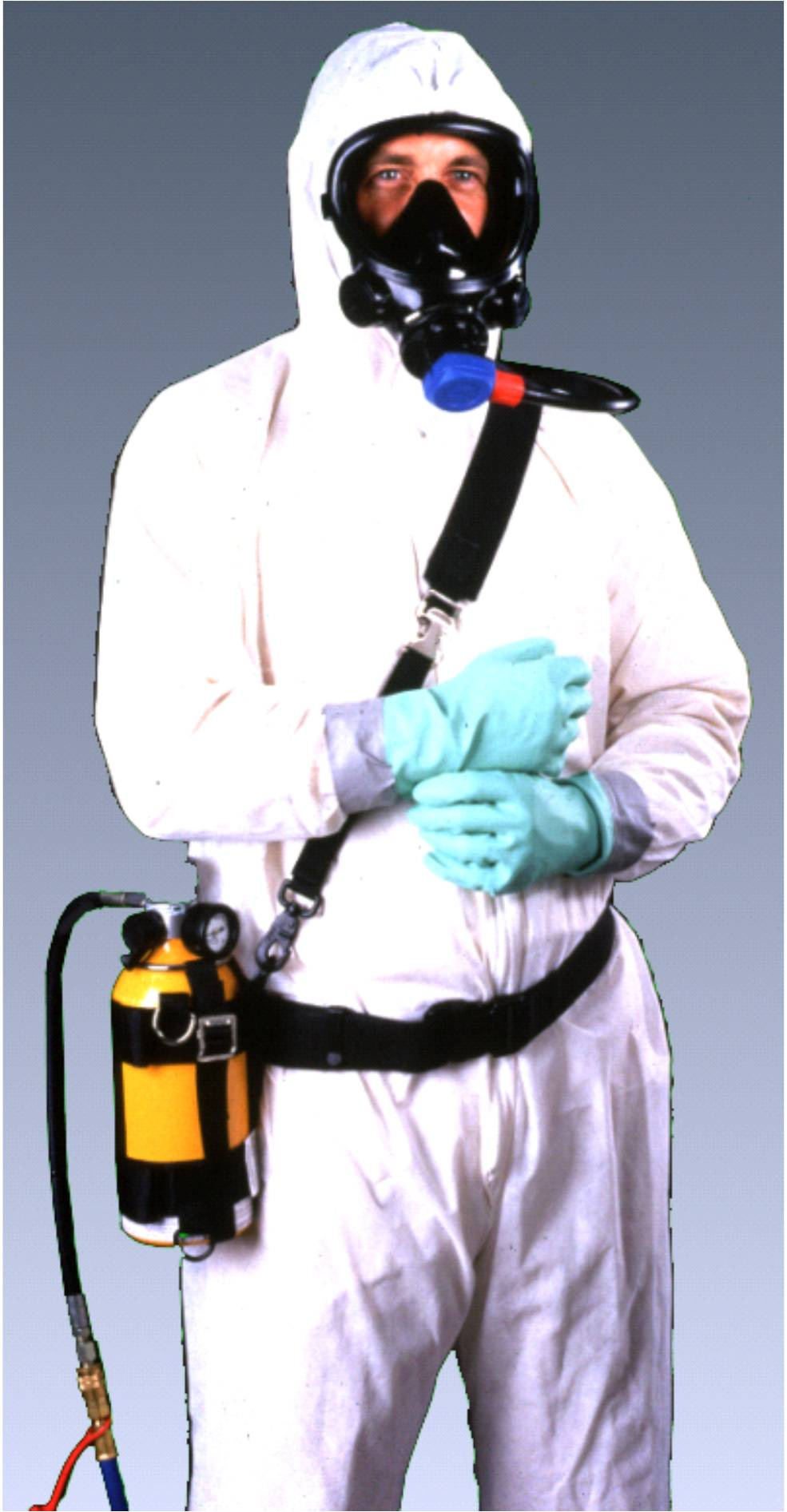 Комбинированный СИЗОД - шланговый респиратор и автономный дыхательный аппарат